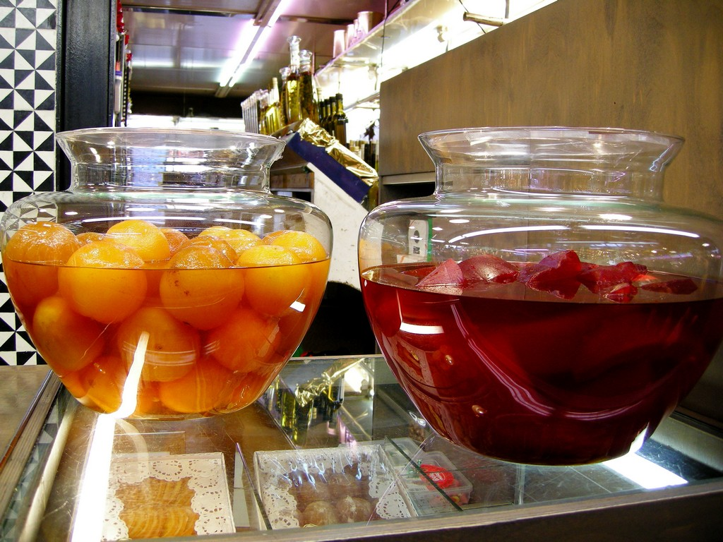 Fruits confits catalans